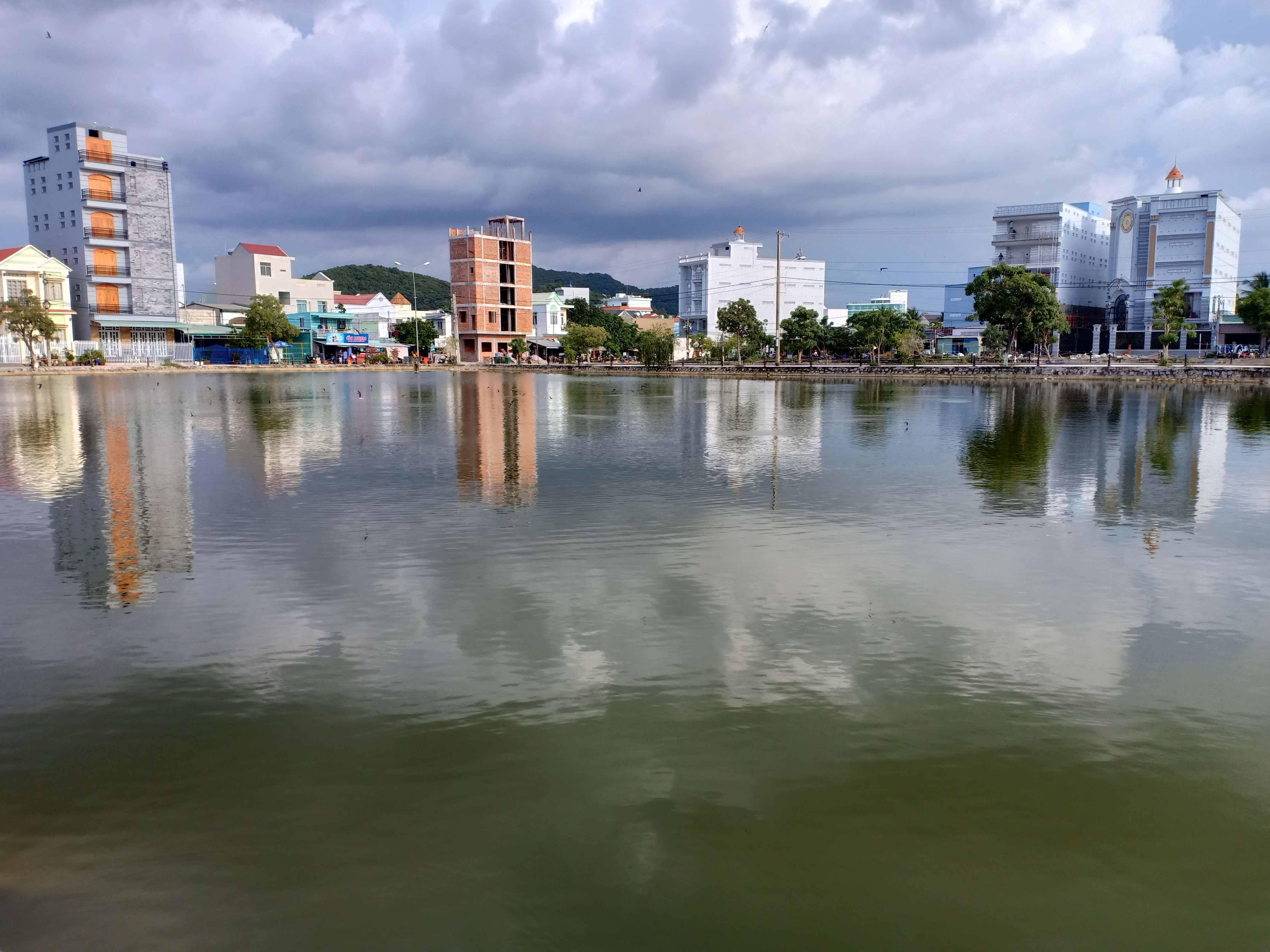 Phong cảnh Hà Tiên qua góc nhìn ống kính, đây là một góc ao sen trước lăng Mạc cửu.